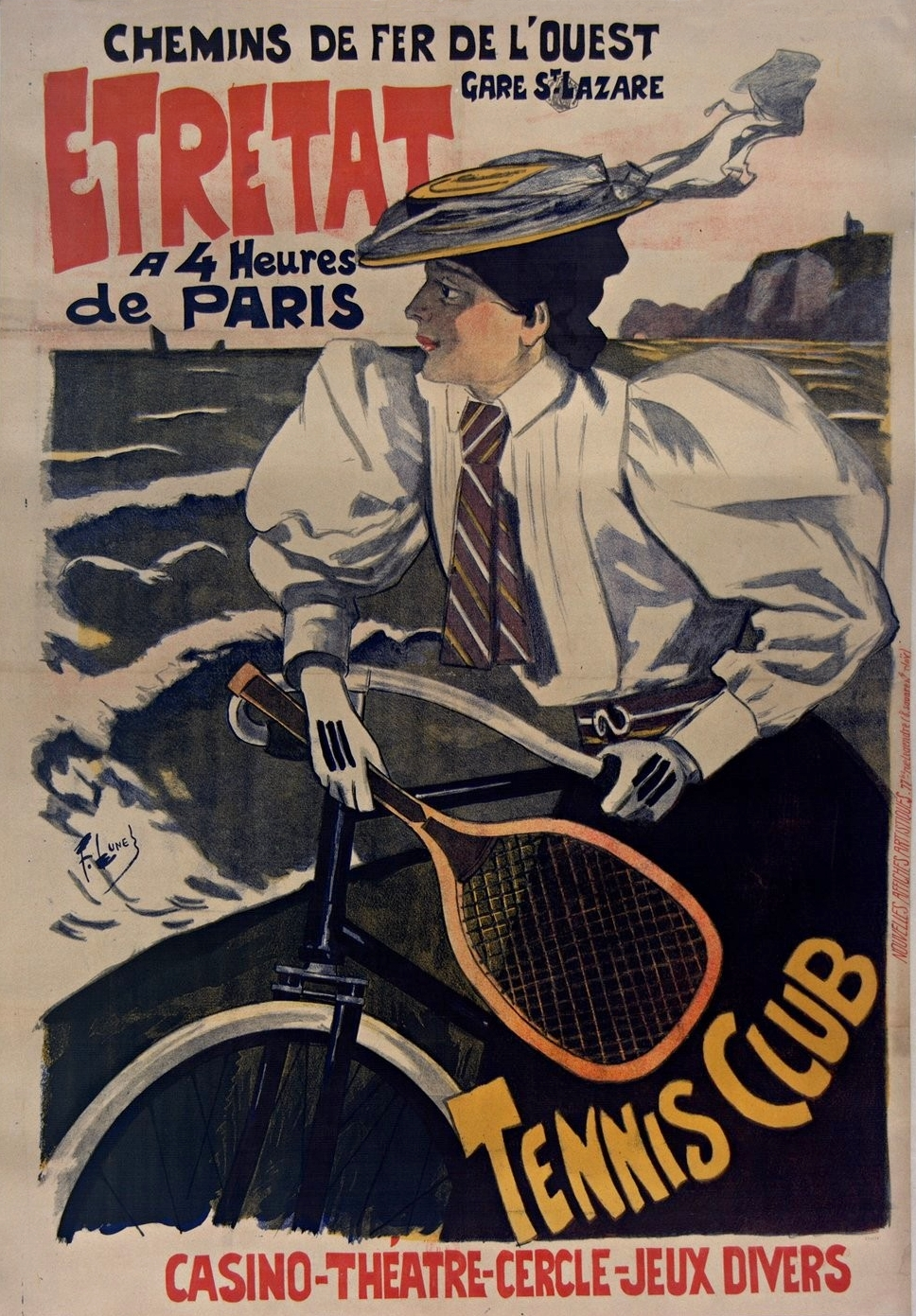 Affiche de Ferdinand Lunel pour les Chemins de Fer de L'Ouest - Étretat. 1896. Bibliothèque nationale de France, ENT DN-1 (LUNEL,Ferdinand/1)-ROUL - Numérisation : Gallica.fr